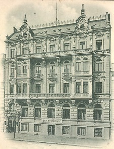 Ansicht des Hotels "Der Reichshof" in der Wilhelmstraße 70a in Berlin, 1899.